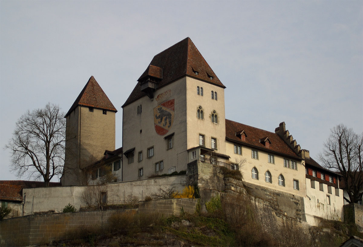 Schloss Burgdorf